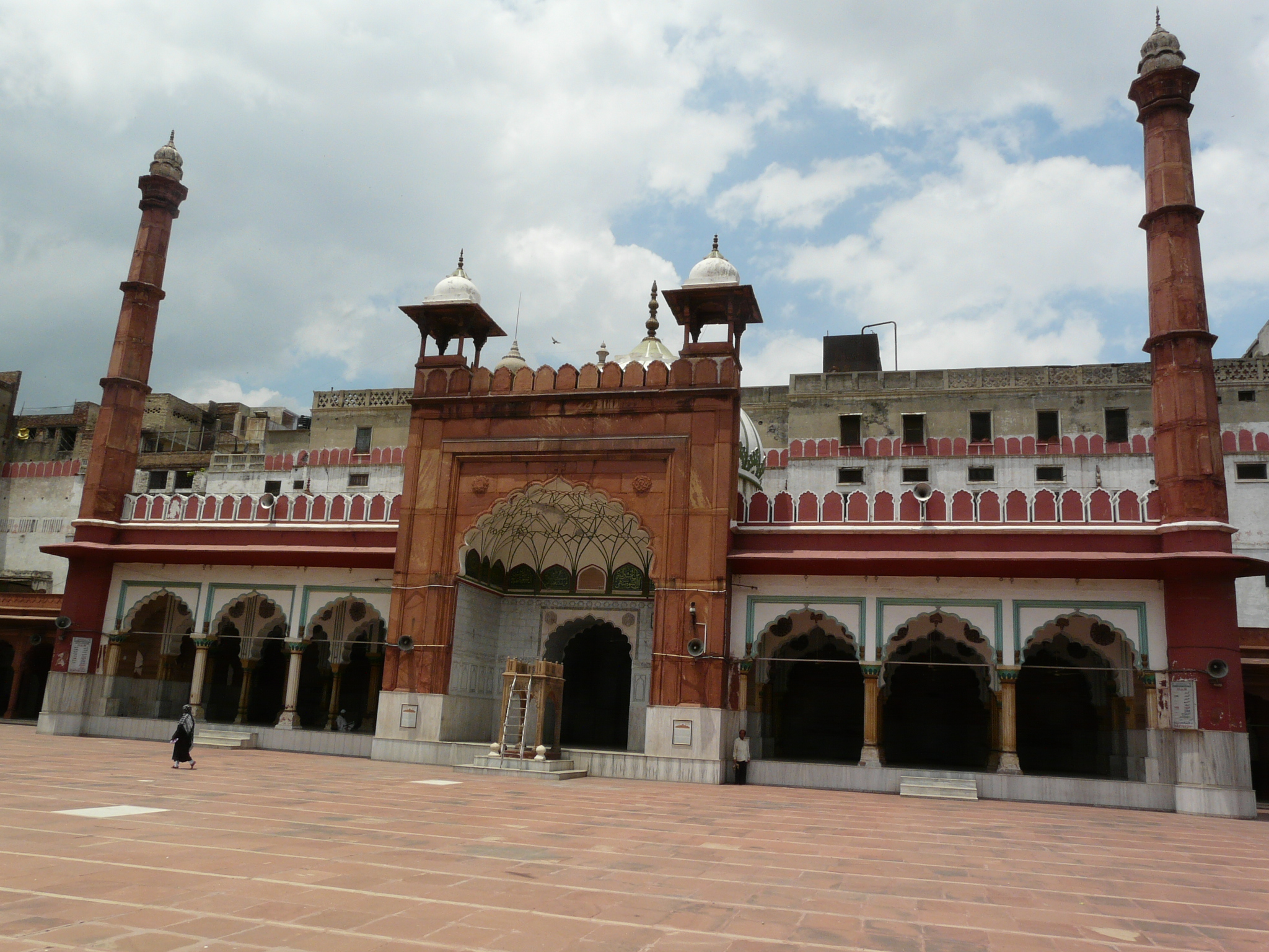 Fatehpuri Masjid, Old Delhi